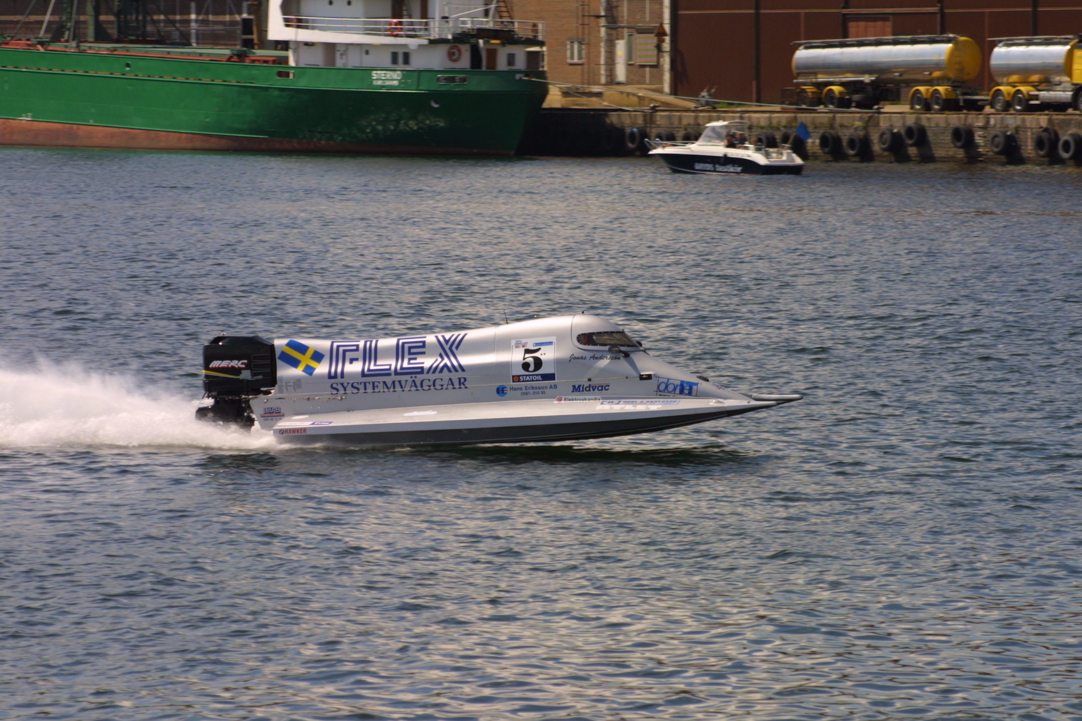 F1 i Karlshamns hamn under Östersjöfestivalen 2001. Jonas Andersson.